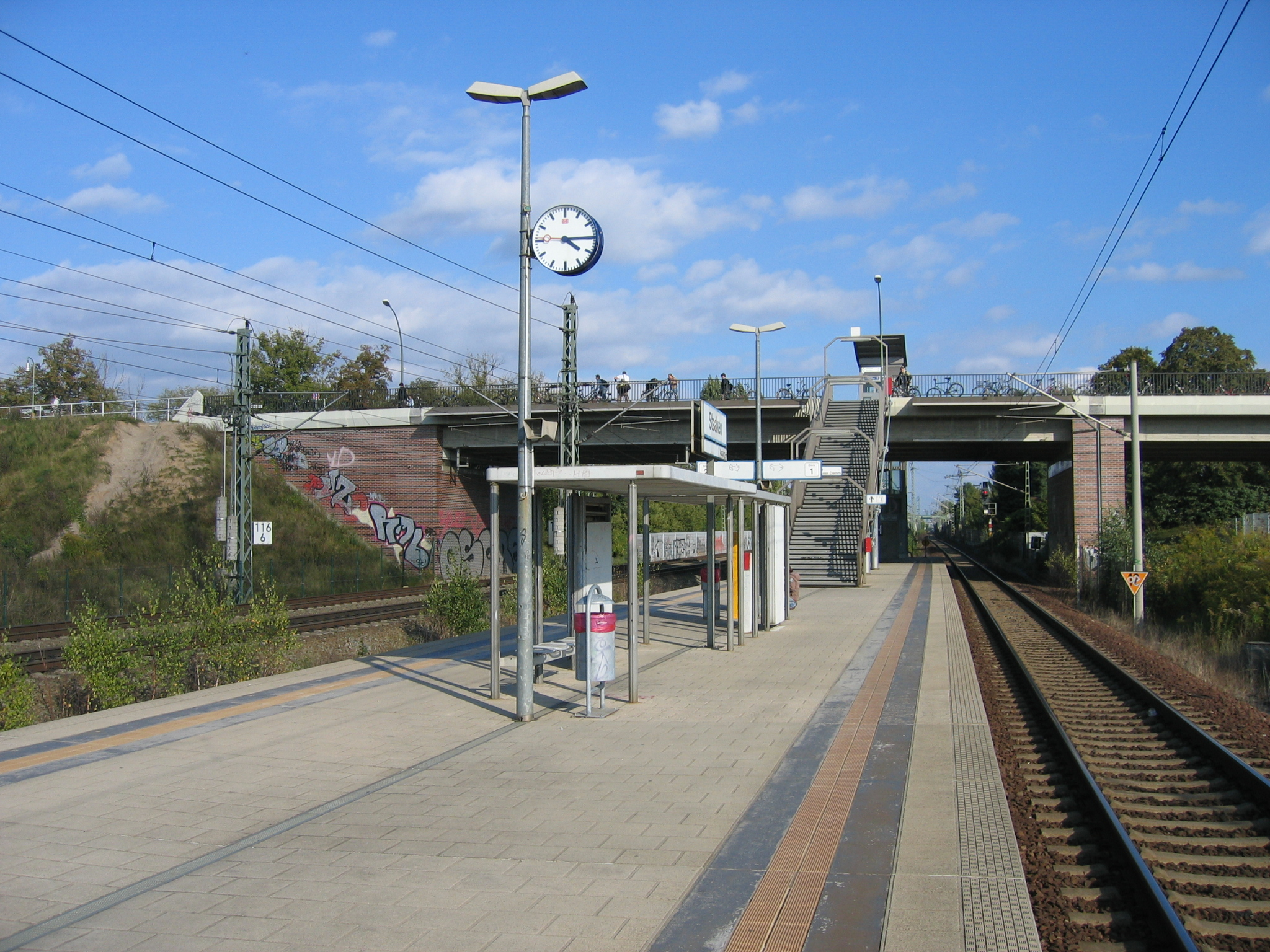 Bahnhof Berlin-Staaken